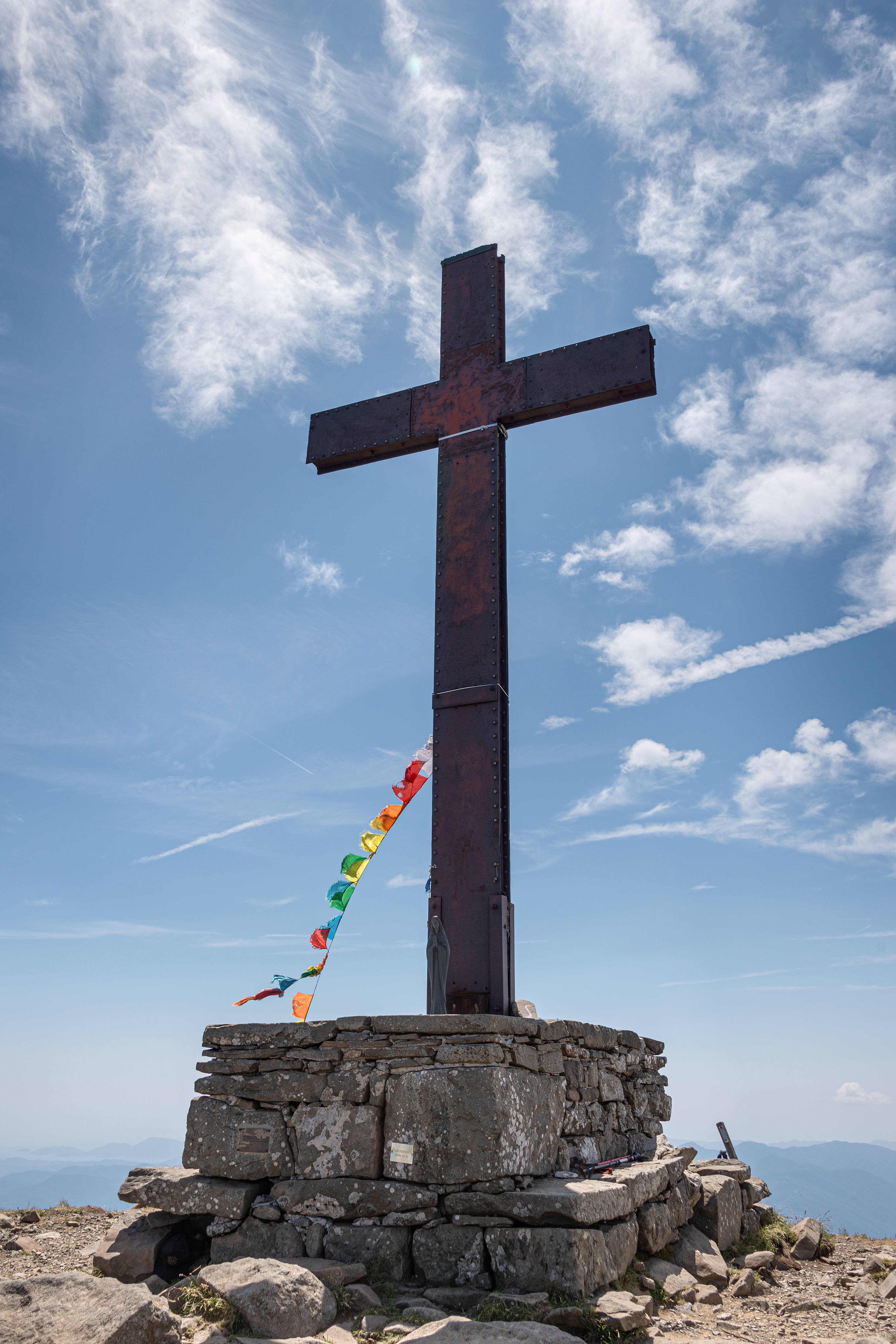 Croce sul Monte Marmagna - Corniglio, Parma, Italia